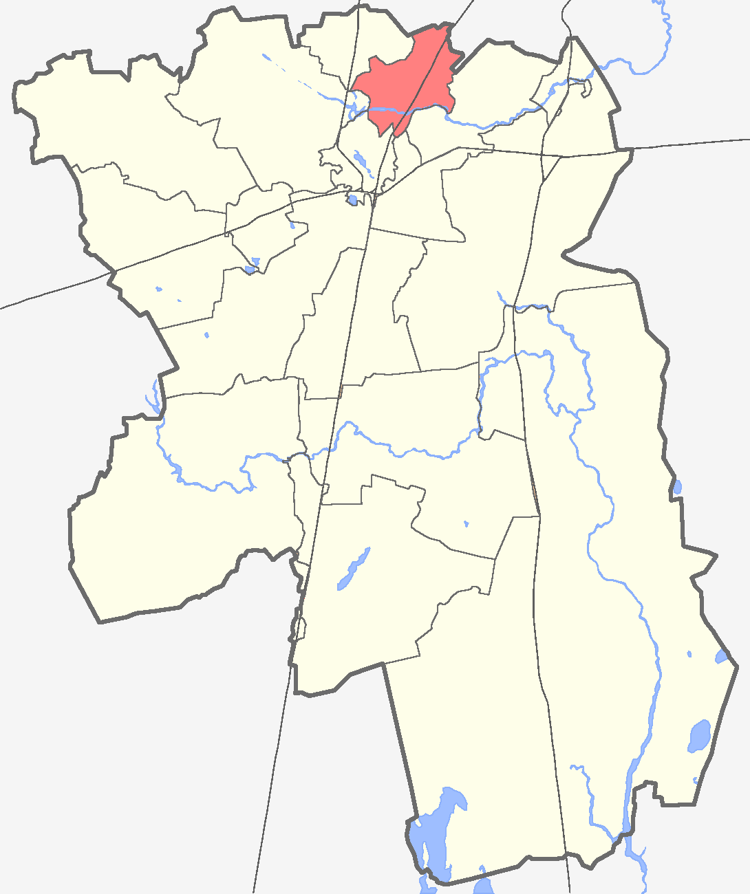 Веревское сельское поселение на карте Гатчинского района